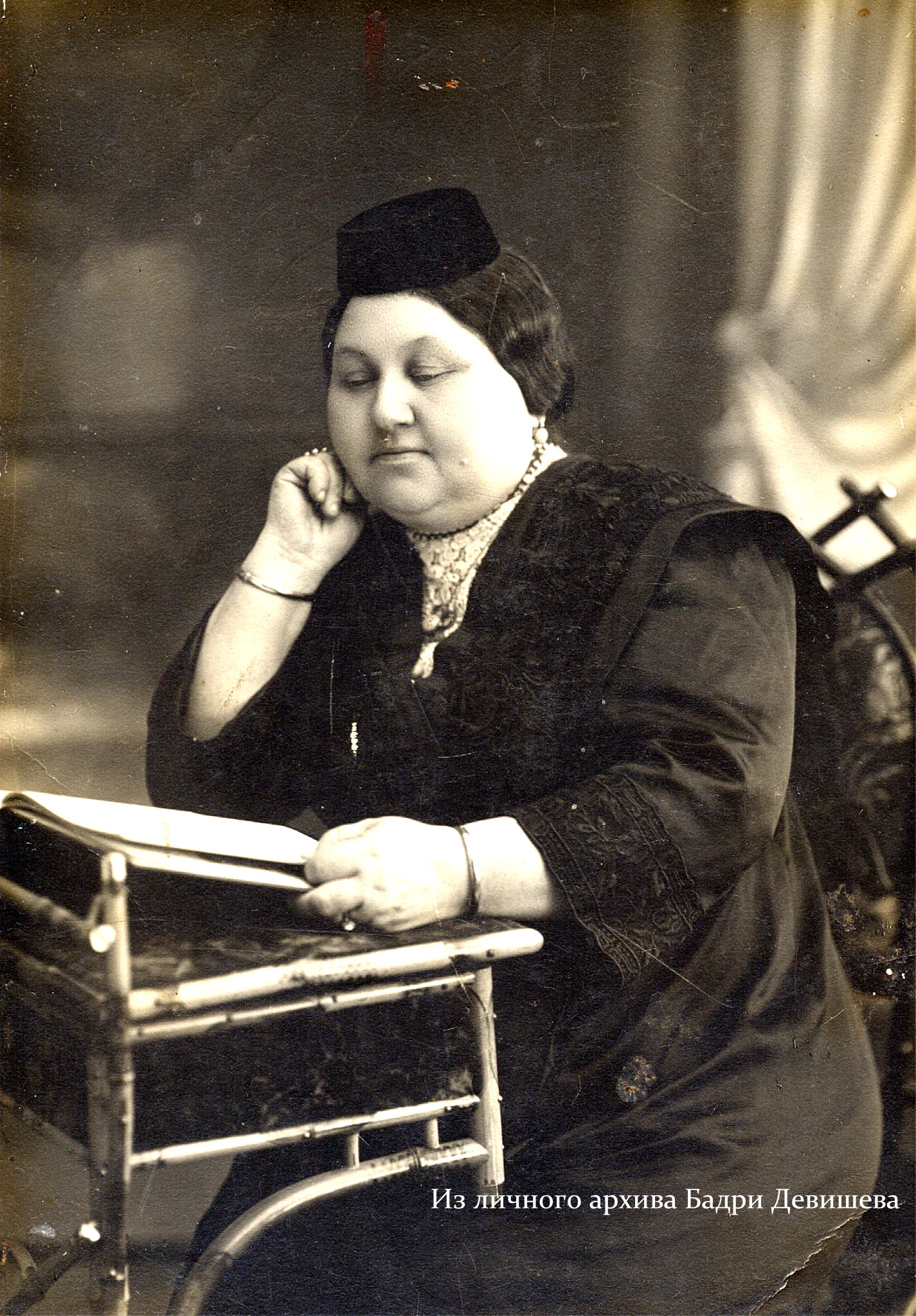 Асьма Садыковна